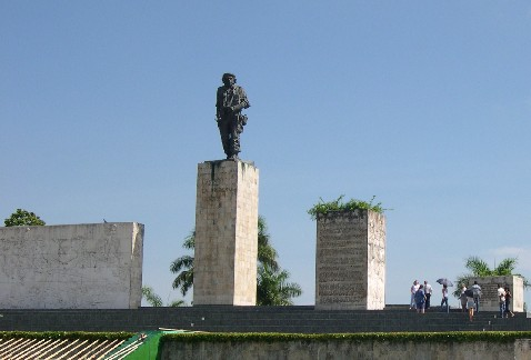 Memorial de Santa Clara (Cuba). Autor: Rafaelji. Cámara Nikon Coolpix. Tomada en Julio de 2004.